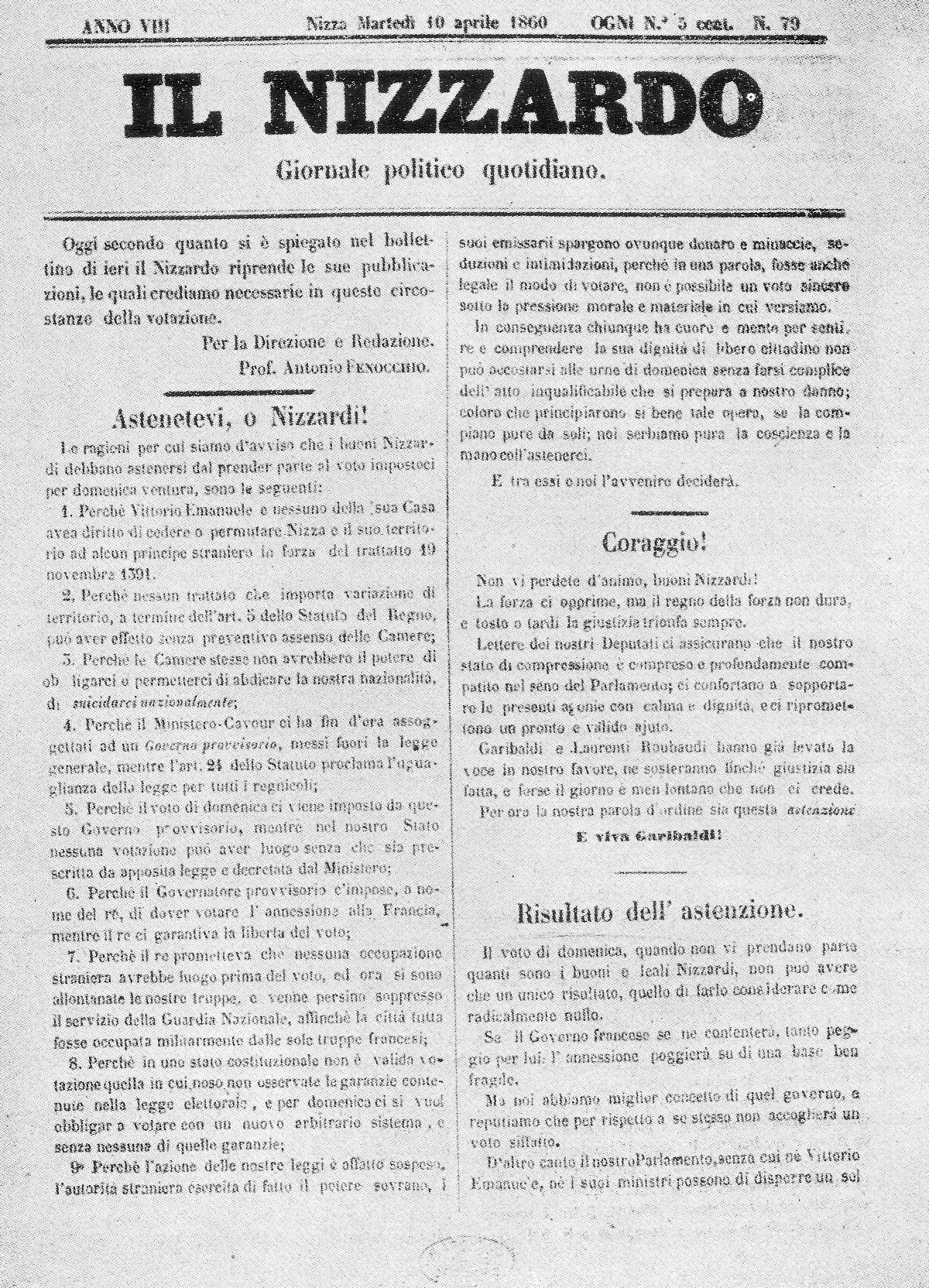 Copia del giornale irredentista italiano "Il Nizzardo"